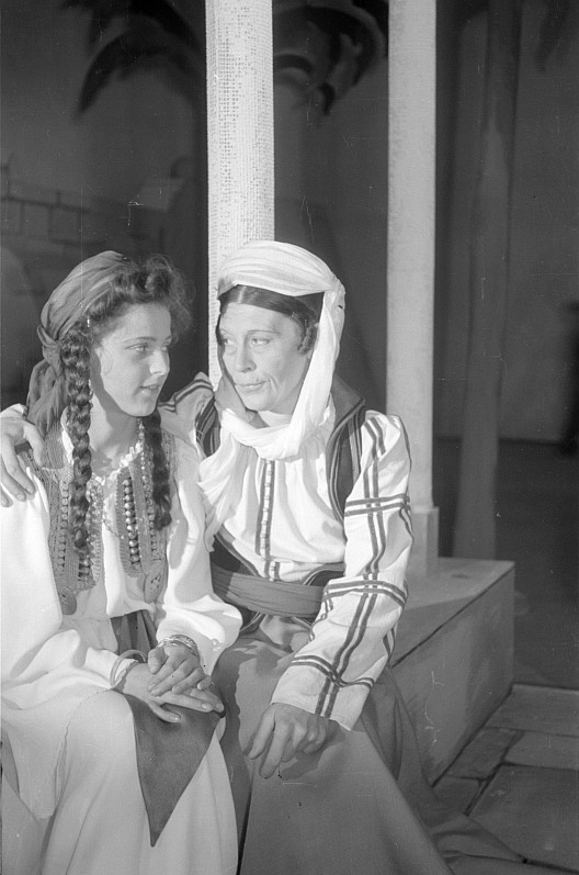 Original image description from the Deutsche FotothekPaul Wegener in der Titelrolle, Agathe Poschmann als Recha, Kai Möller als Sultan Saladin und Eduard von Winterstein als Klosterbruder Agathe Poschmann and Gerda Müller at the Deutschen Theater in Berlin in 1945.